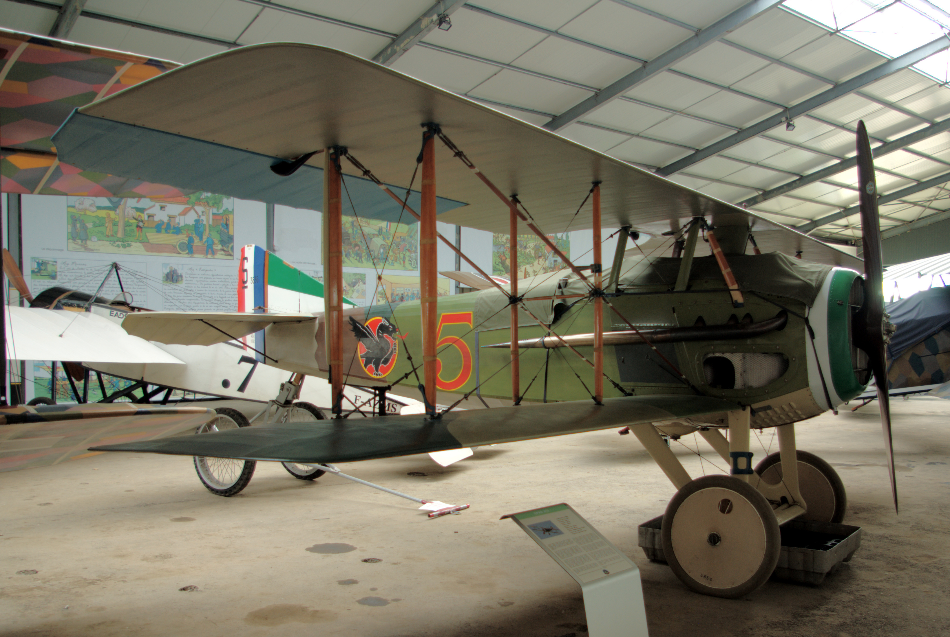 SPAD XIII C.1